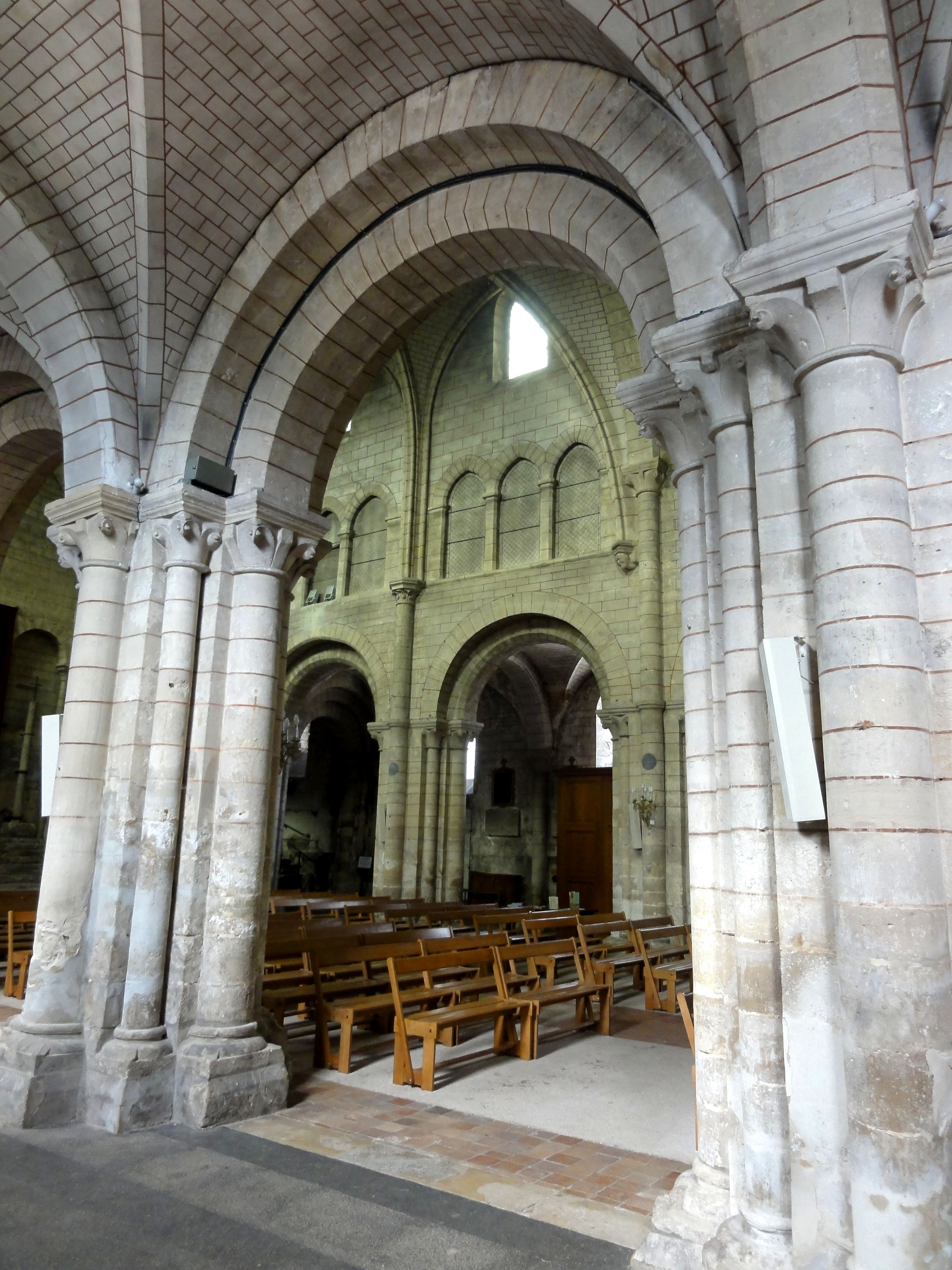 Bas-côté sud, vue par la sixième grande arcade.